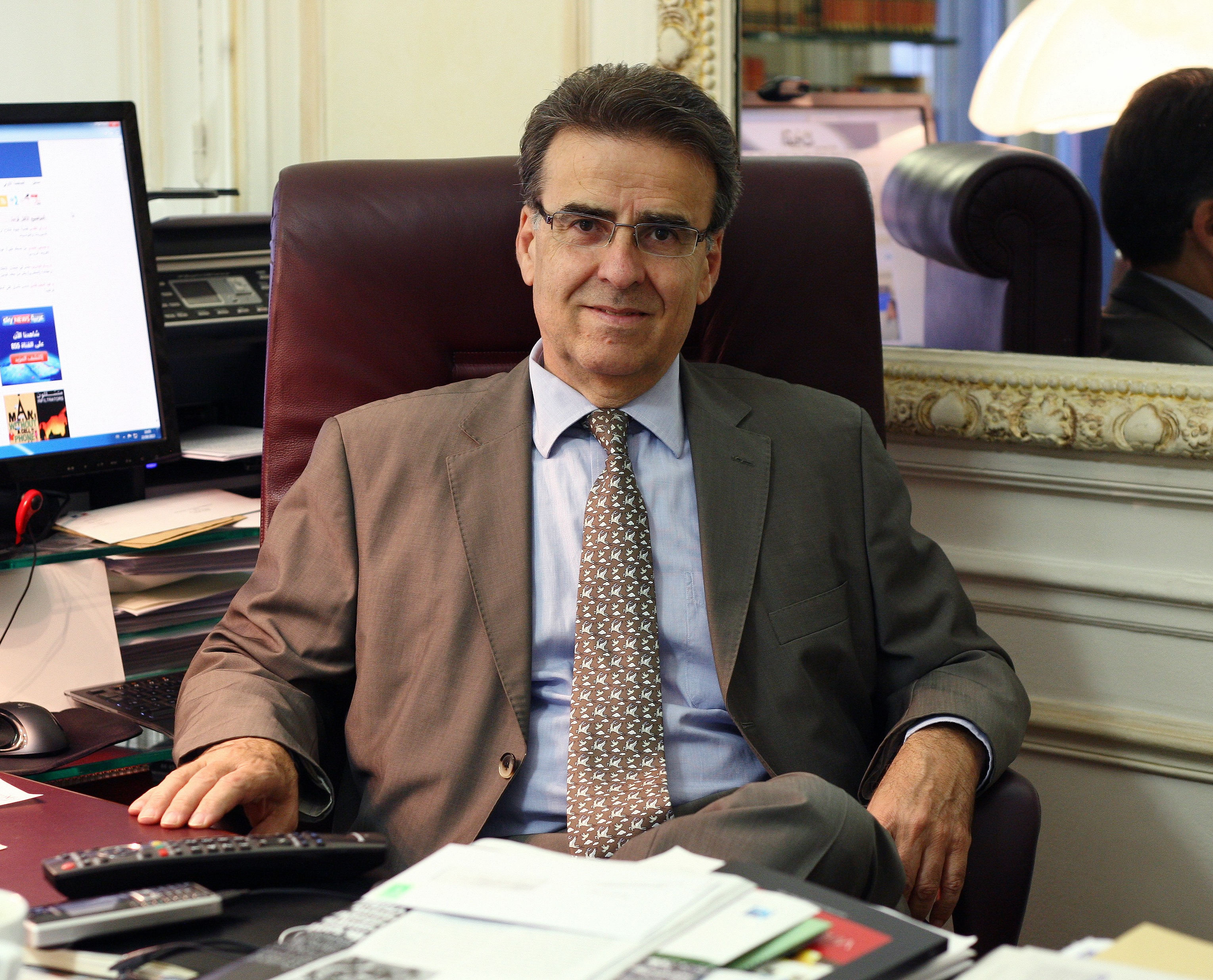 Antoine Basbous